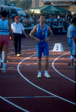 Photo Philippe GONIGAM